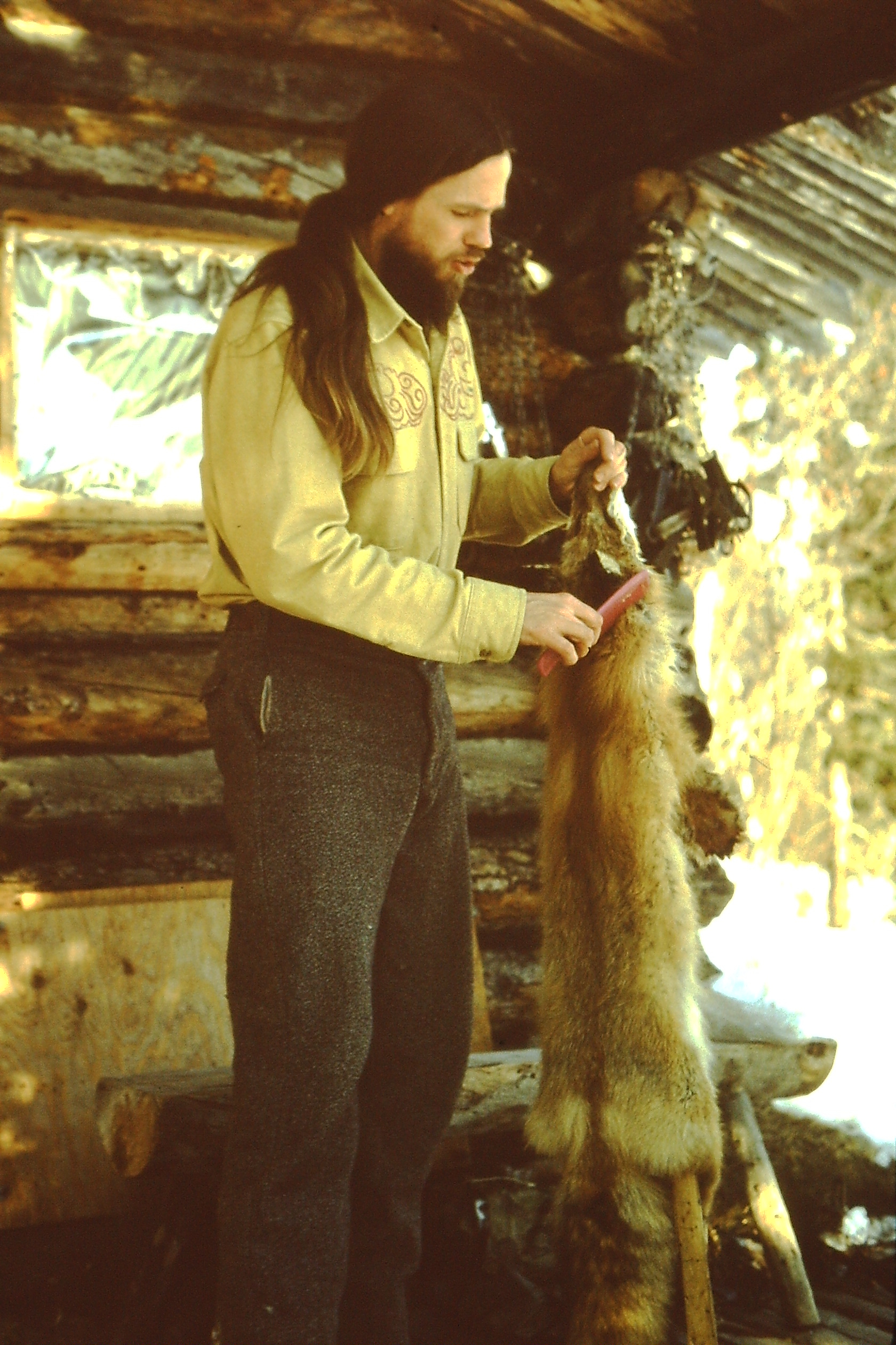 Brooks Range, Alaska. Aufarbeiten der Felle durch den Trapper vor dem Verkauf.